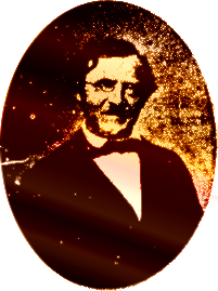 Jean Chrétien Ferdinand Hoefer (1811-1878)